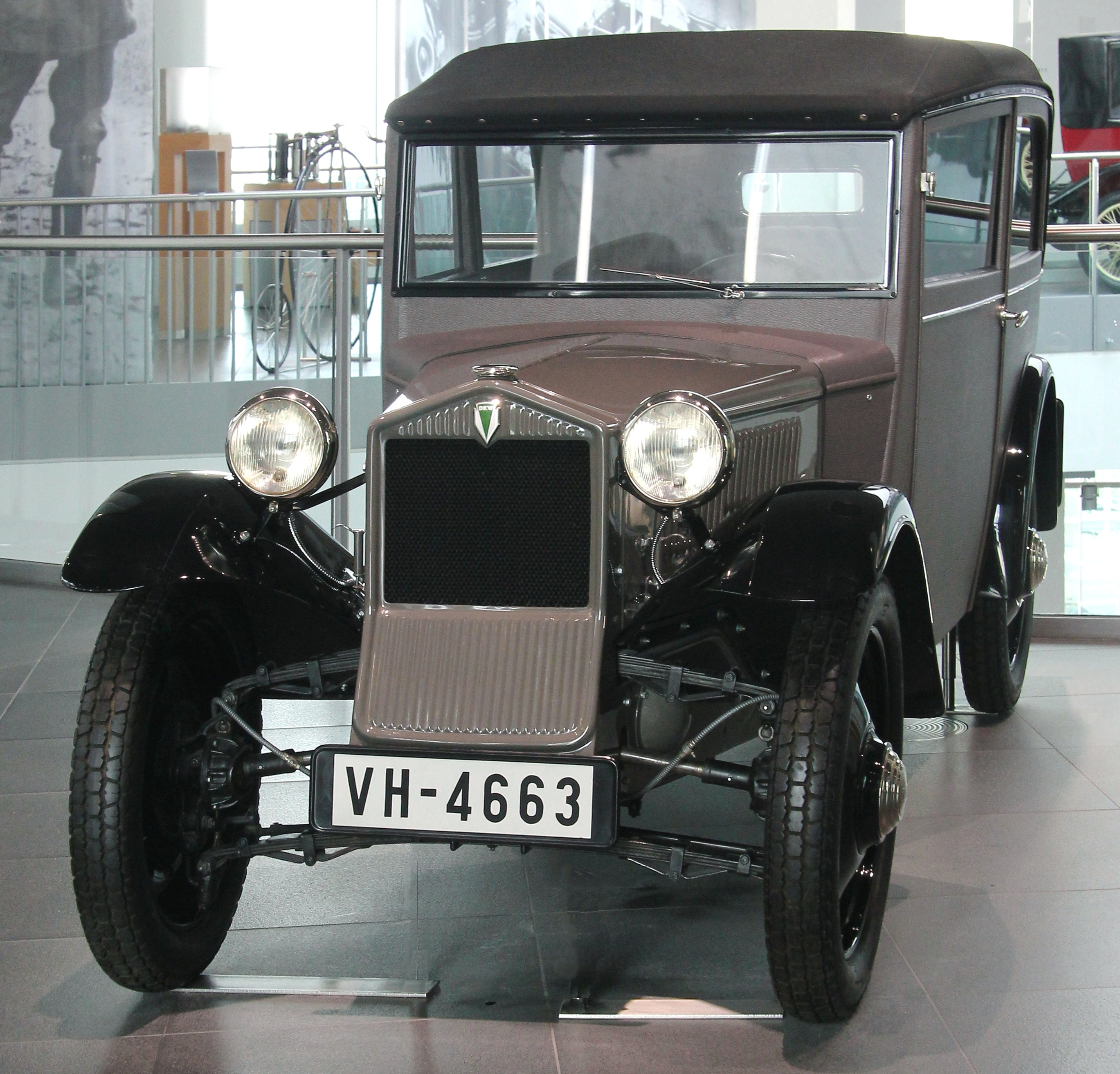 DKW F1 Limousine, kunstlederbezogene Holzkarosserie, Baujahr 1931, erster DKW mit Frontantrieb, im museum mobile in Ingolstadt. Das Auto hatte einen 2-Zylinder-Zweitaktmotor, 494 cm³, 15 PS.